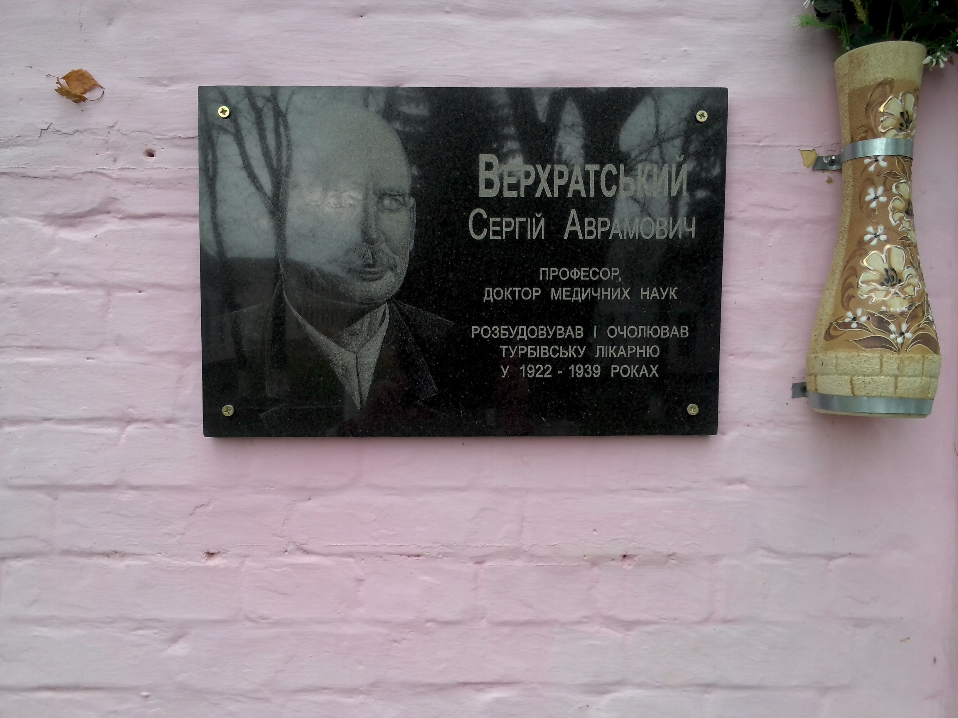 Турбівська міська лікарня. Меморіальна дошка С.А. Верхатському